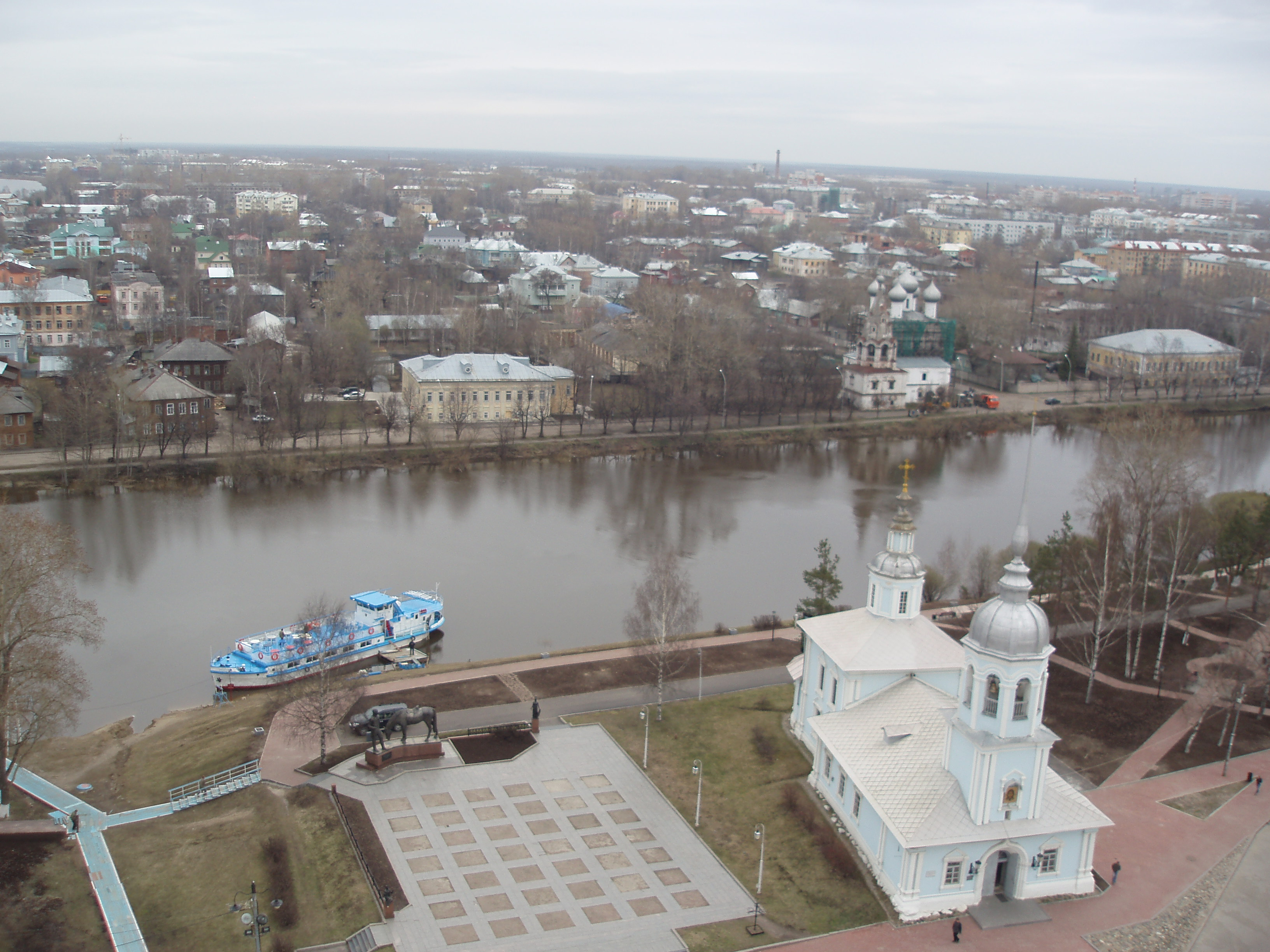 Церковь Александра Невского (Вологодская область, Вологда, С. Орлова улица)